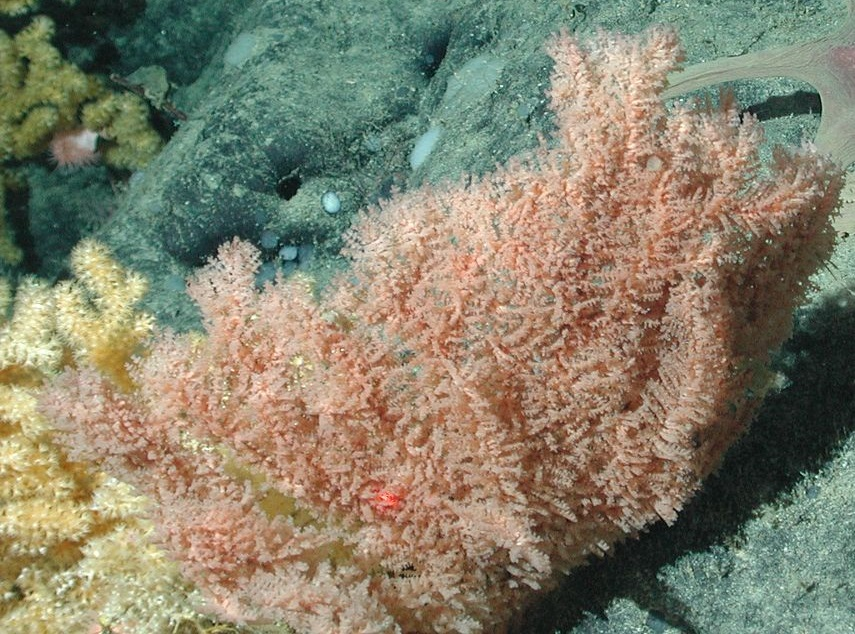 Trissopathes en montaña marina de Davidson, California, a 1.793 m.